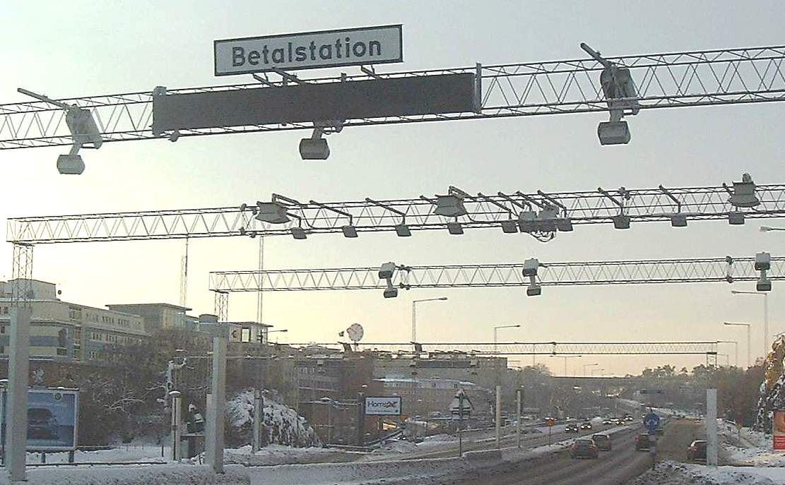 Automatic tollstation at Liljeholmen, Stockholm, Sweden. I took this photo at Liljeholmsbron. See also: Image:Automatic tollstation at Lilla Essingen Stockholm.jpg